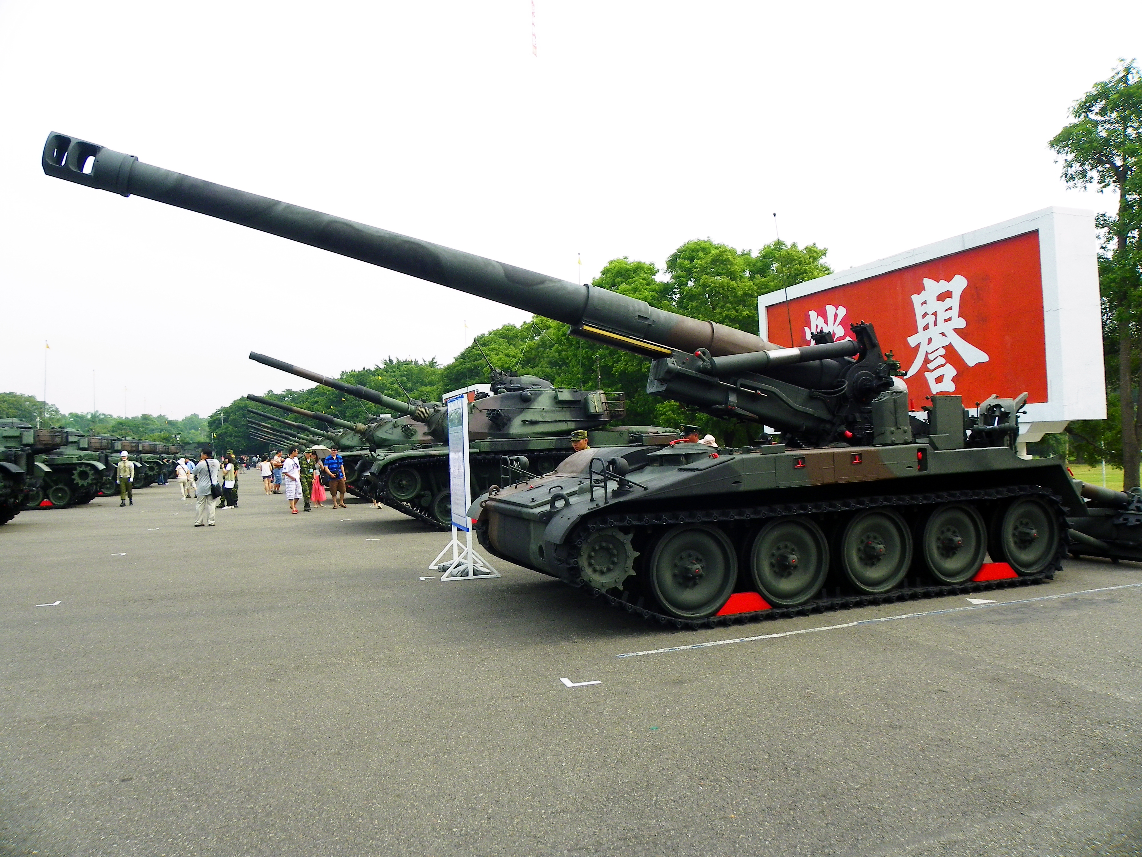 2011年陸軍成功嶺營區開放活動，陳列於介壽臺大校場東端的M110自走榴彈砲與後方M60A3戰車隊。